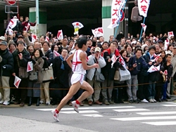 箱根駅伝（復路）・中央大学